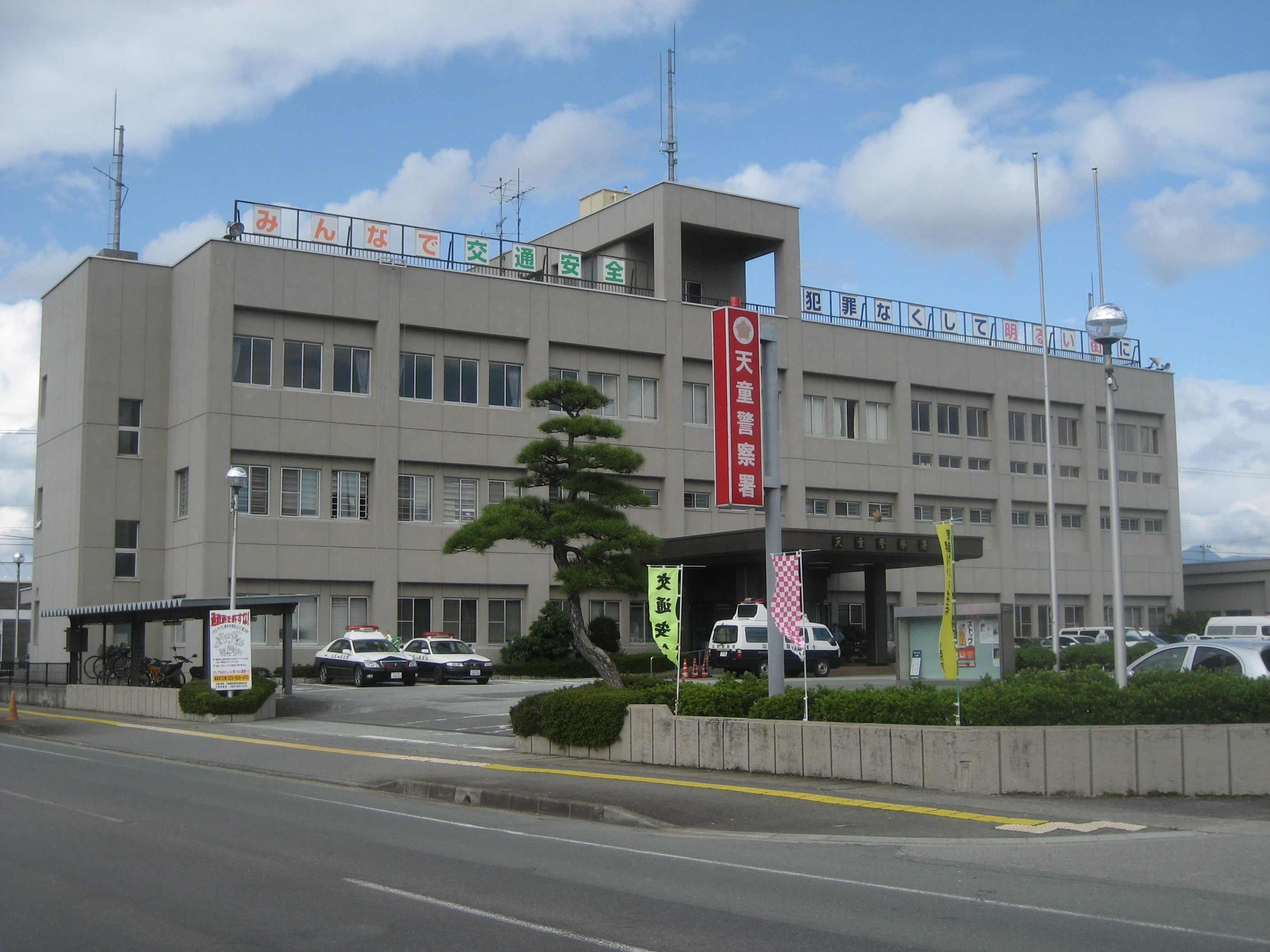 山形県天童警察署庁舎